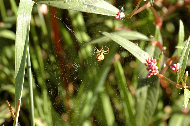 Metellina segmentata web, from Commanster, Belgian High Ardennes .